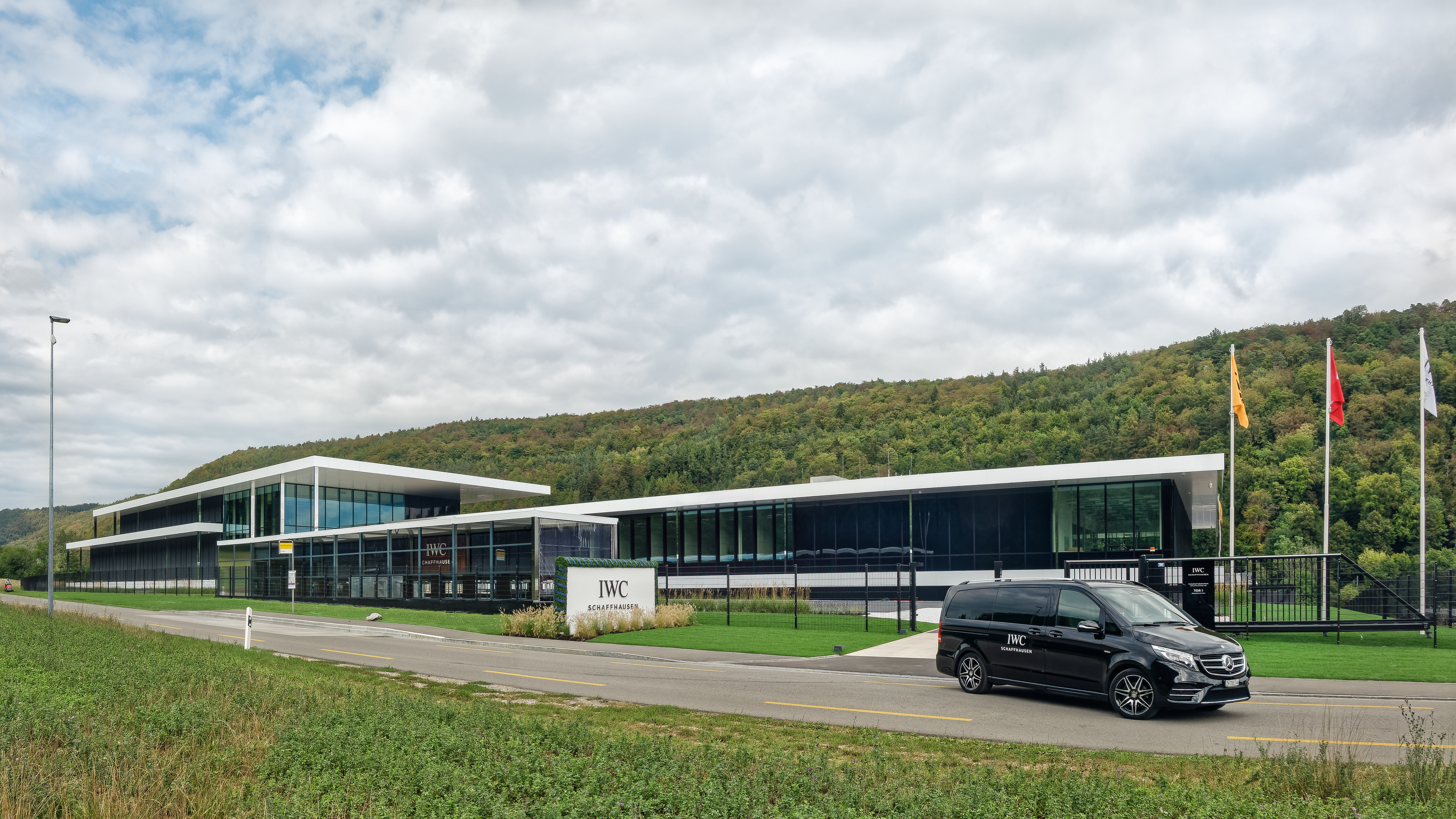 IWC Schaffhausen.(International Watch Company). Manufakturzentrum im Merishausertal. In Betrieb seit August 2018.